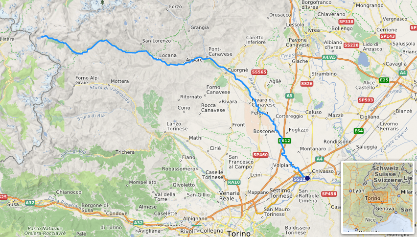 carte réalisée sur umap, [1] This map may be incomplete, and may contain errors. Don't rely solely on it for navigation.